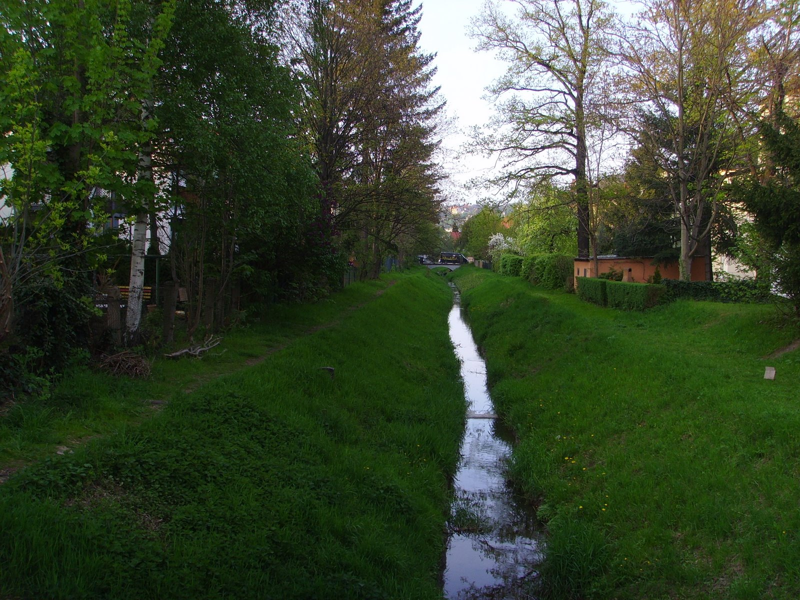 Landgraben im Dresdner Stadtteil Striesen - Blickrichtung Norden